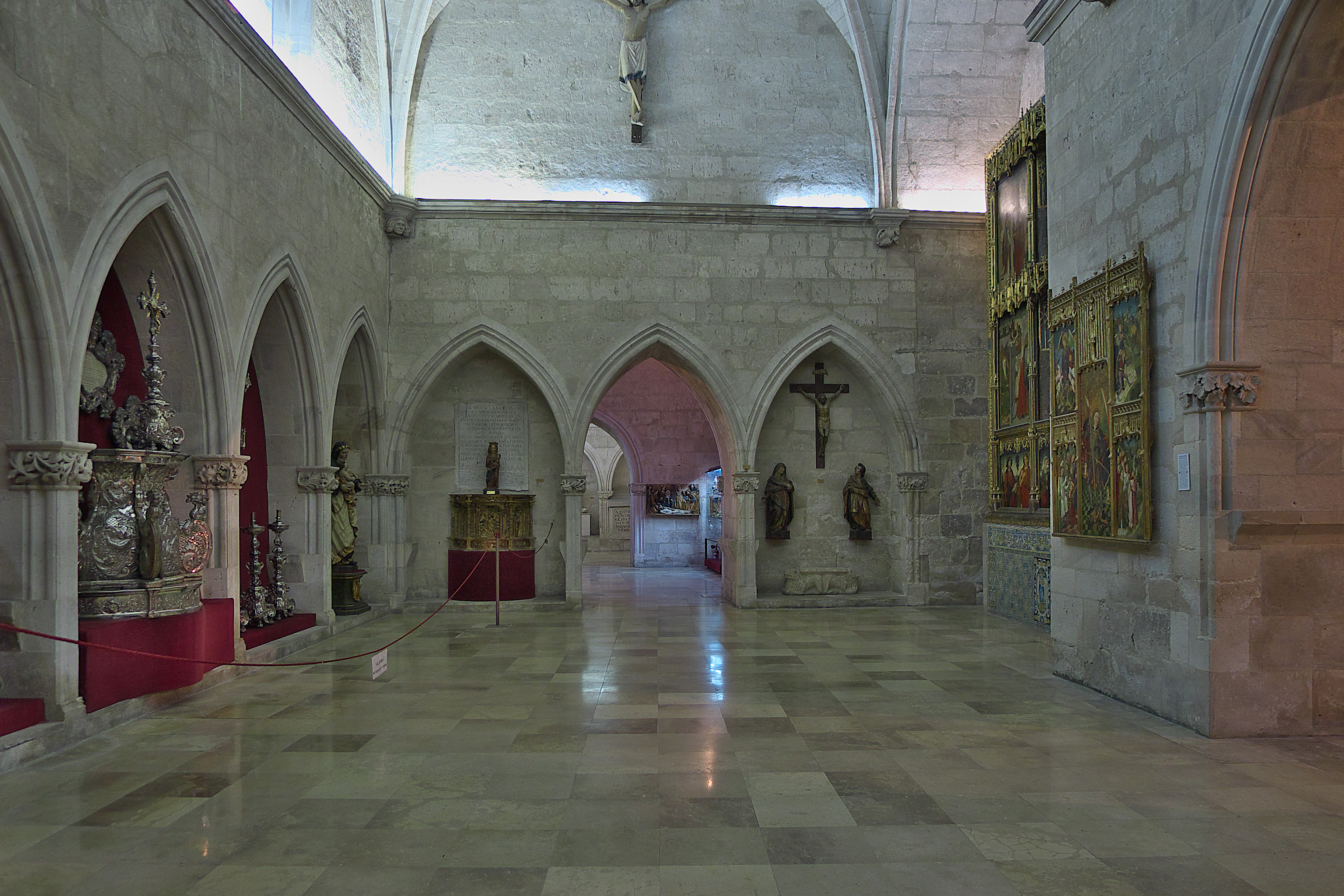 Antigua capilla funeraria de la Colegiata de Santa María la Mayor (Valladolid) (s. XIV), hoy adaptada al Museo Catedralicio.